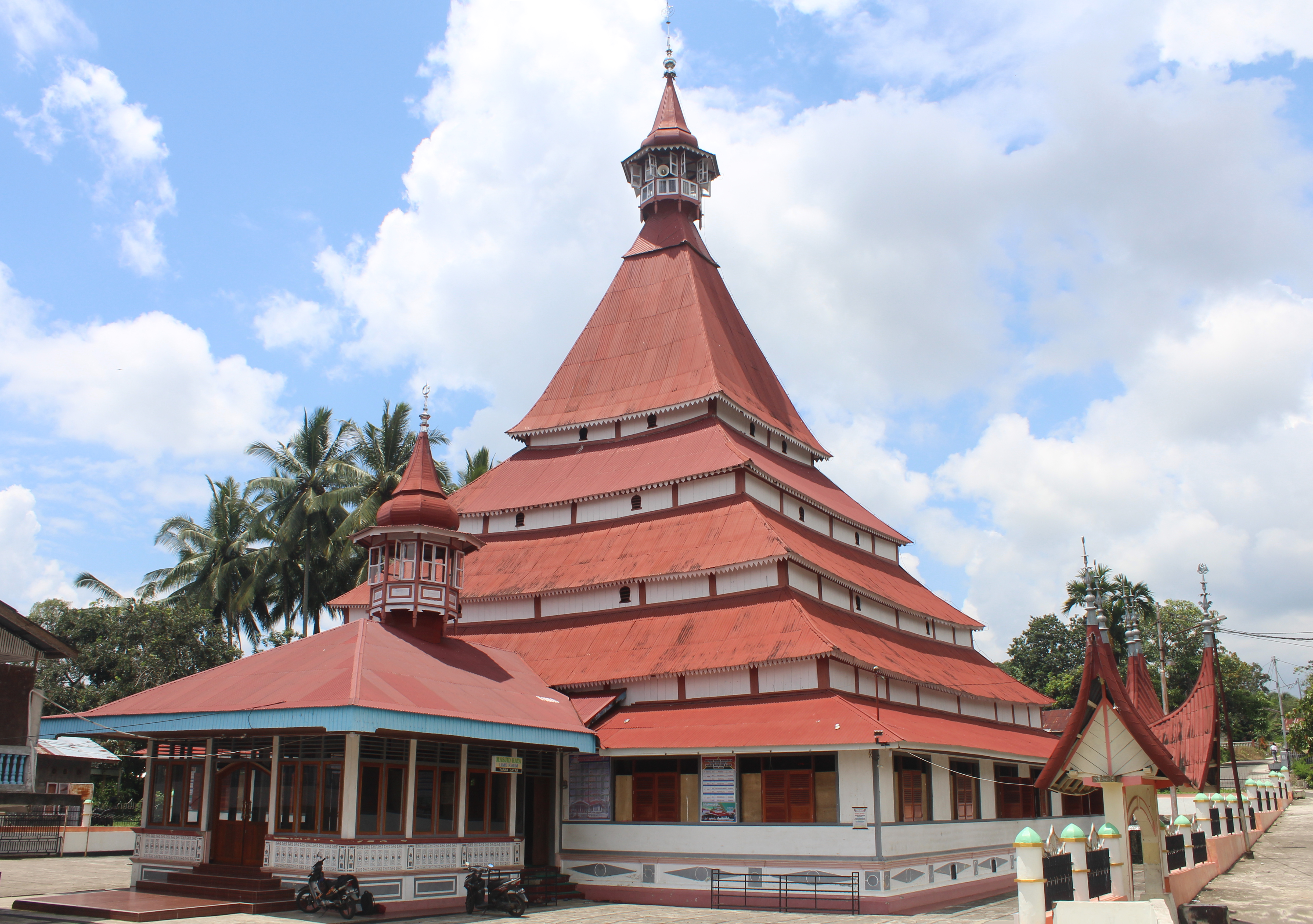 Masjid Raya Lima Kaum di Nagari Lima Kaum, Kecamatan Lima Kaum, Kabupaten Tanah Datar, Sumatra Barat, Indonesia.